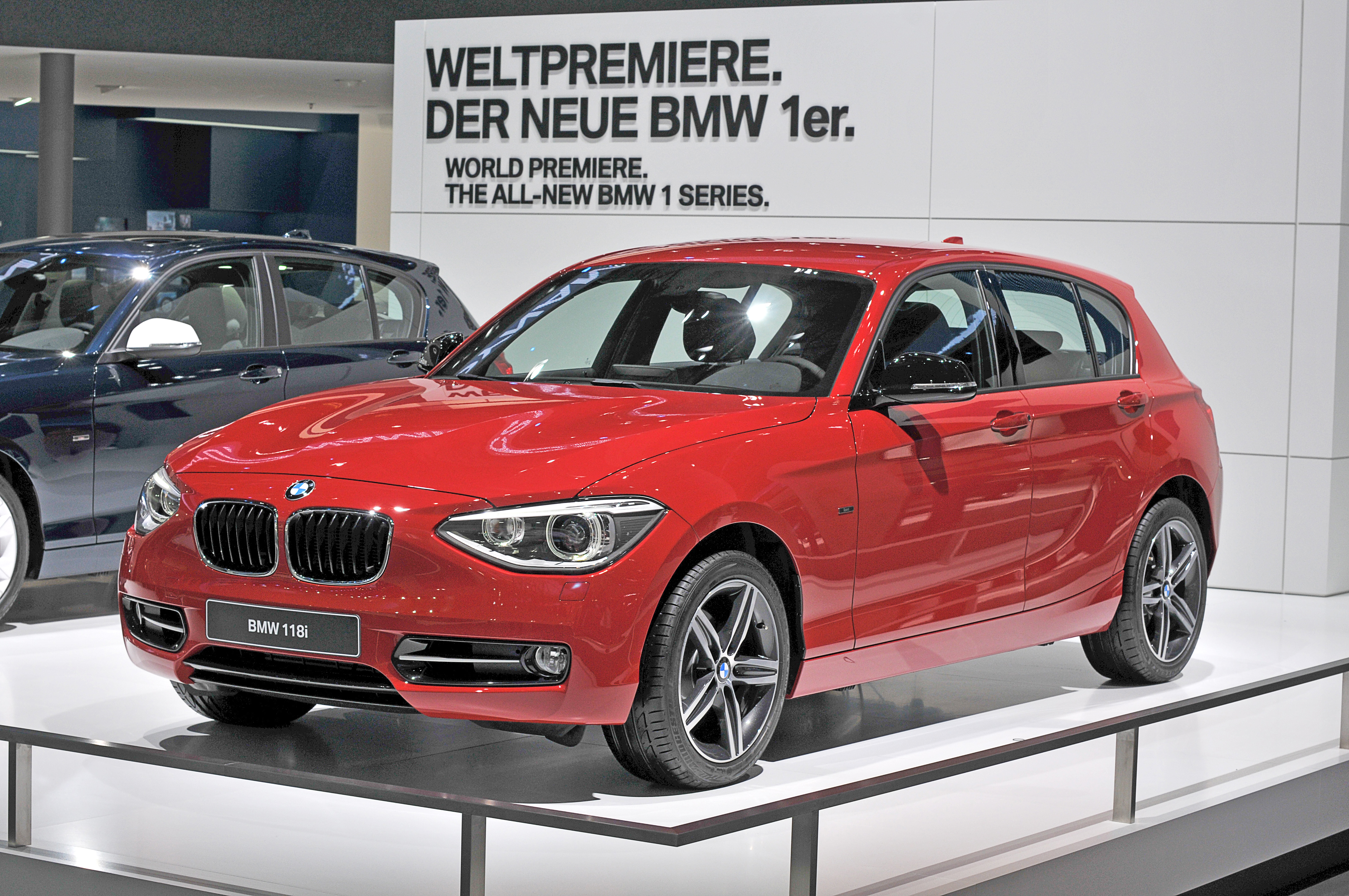 IAA 2011; BMW F20